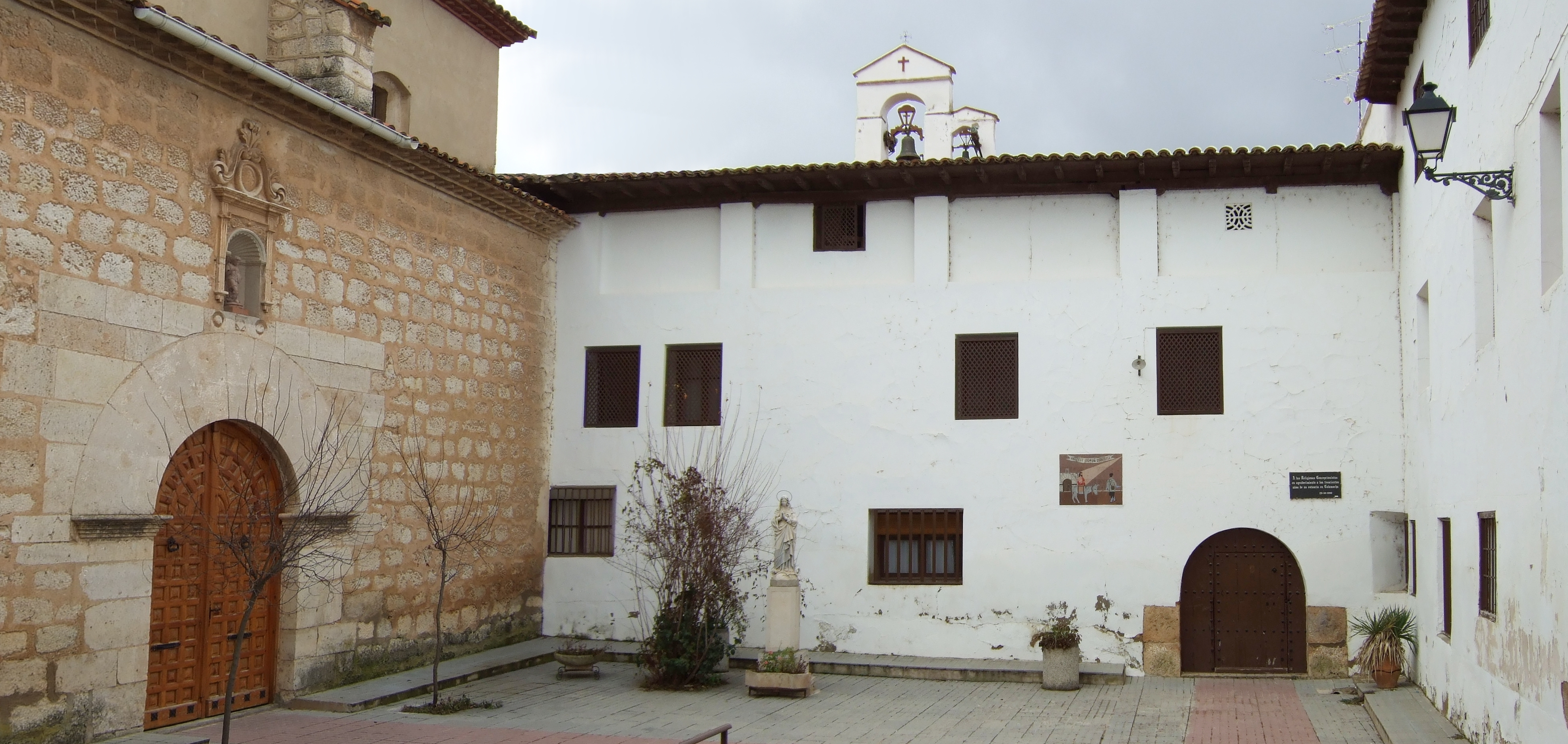 Calamocha - Convento de la Concepción - Barroco del siglo XVII